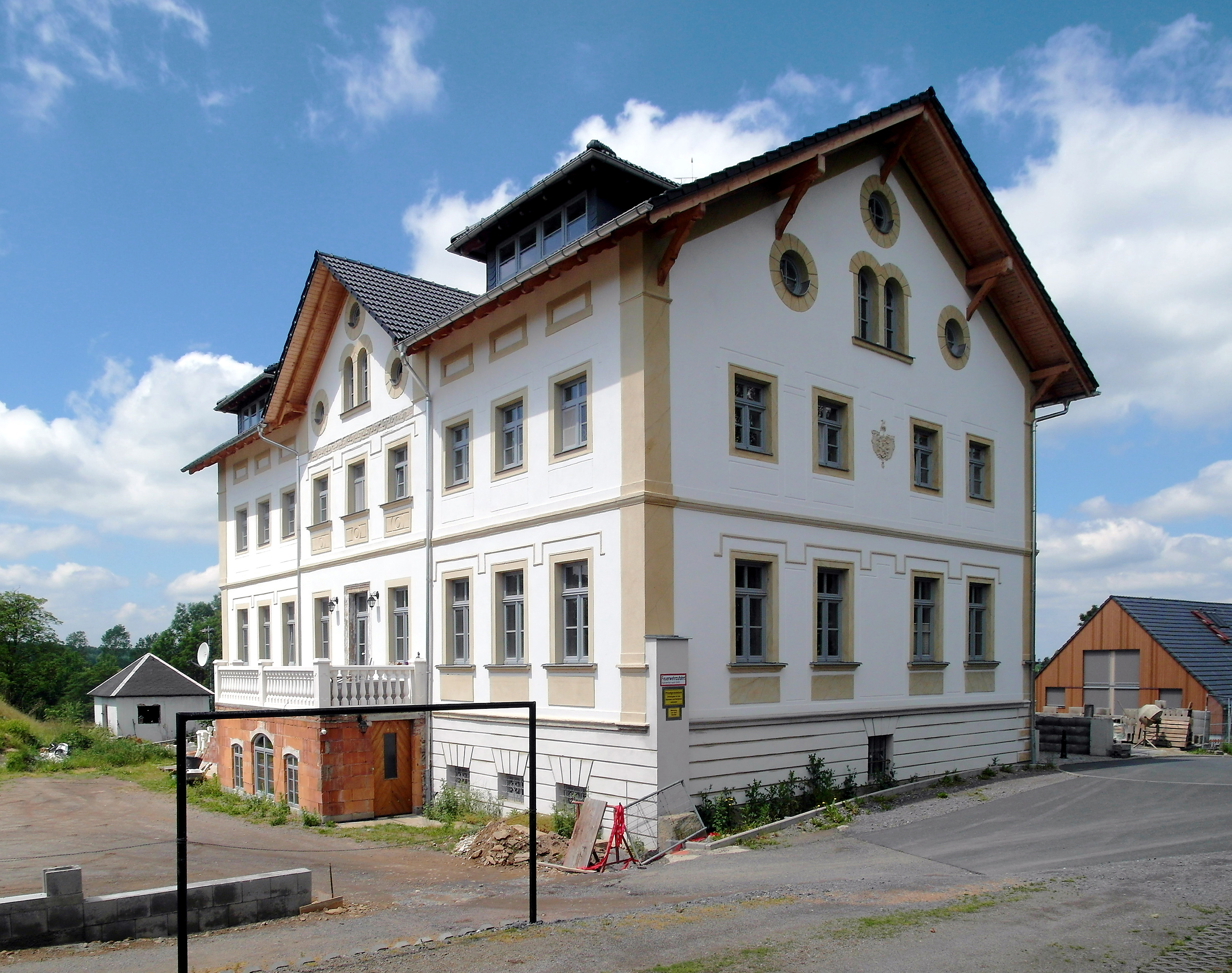 10.06.2015 09618 Langenau (zu Brand-Erbisdorf): Rittergut, Herrenhaus Oberlangenau, Hofstraße 9. Sicht von Südosten.[SAM0877.JPG]20150610500DR.JPG(c)Blobelt